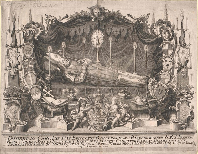 Friedrich Karl von Schönborn (1674-1746), Fürstbischof von Würzburg und Bamberg, auf dem Sterbebett